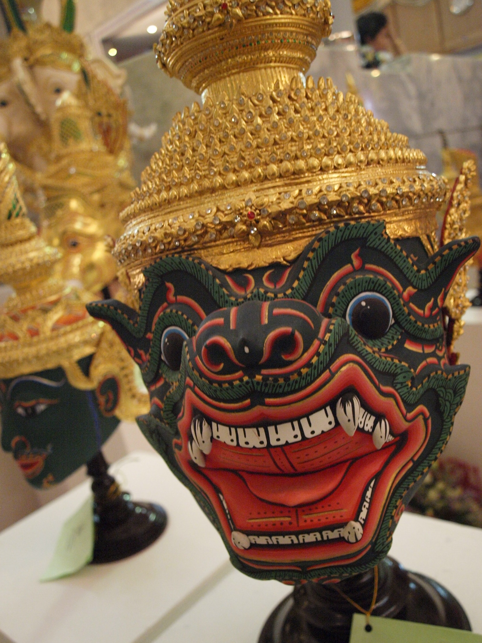 หัวโขน บันทึกภาพจากหอประชุมใหญ่ ศูนย์วัฒนธรรม